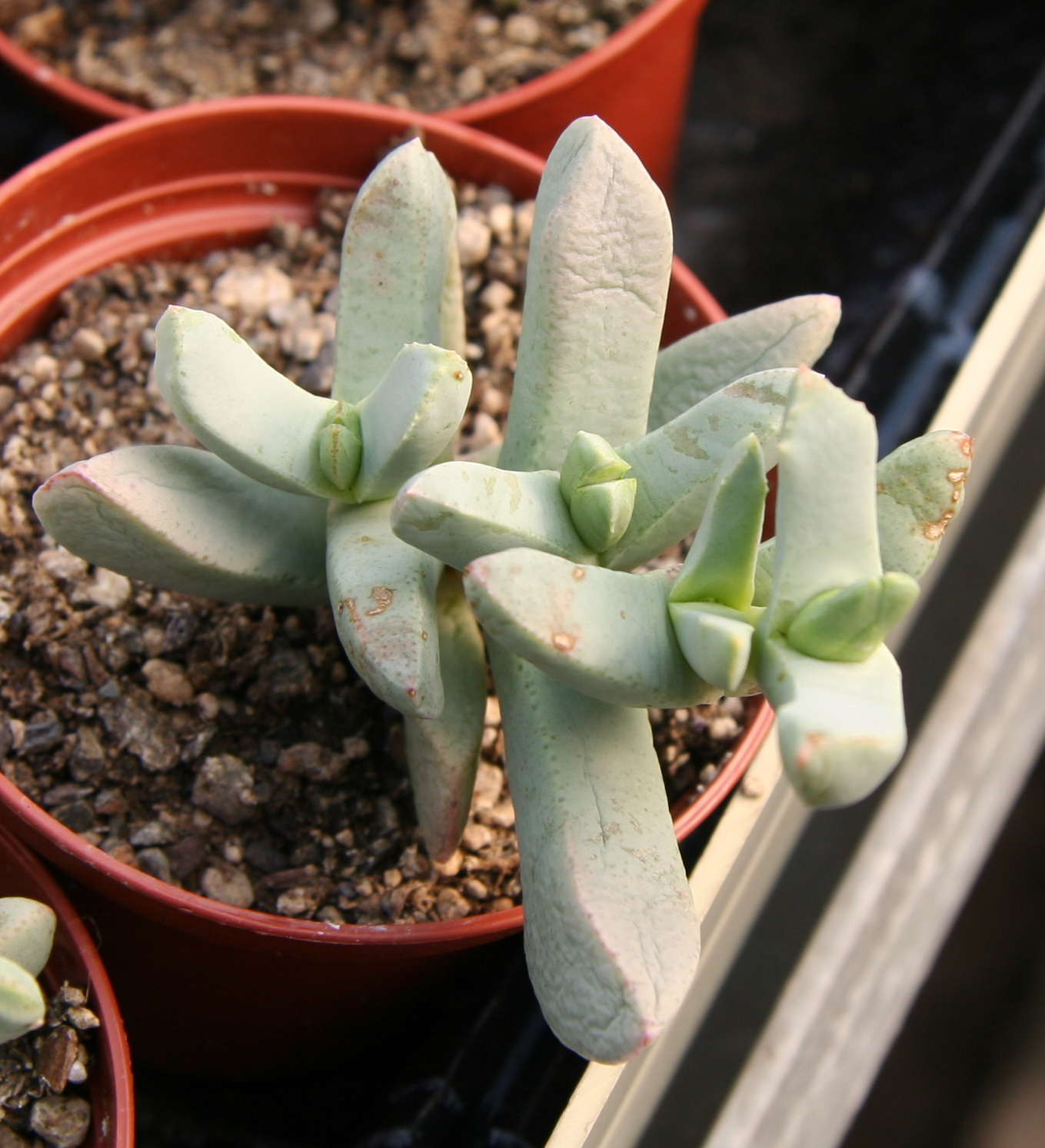 Juttadinteria decumbens in Kultur bei Kakteen-Haage in Erfurt